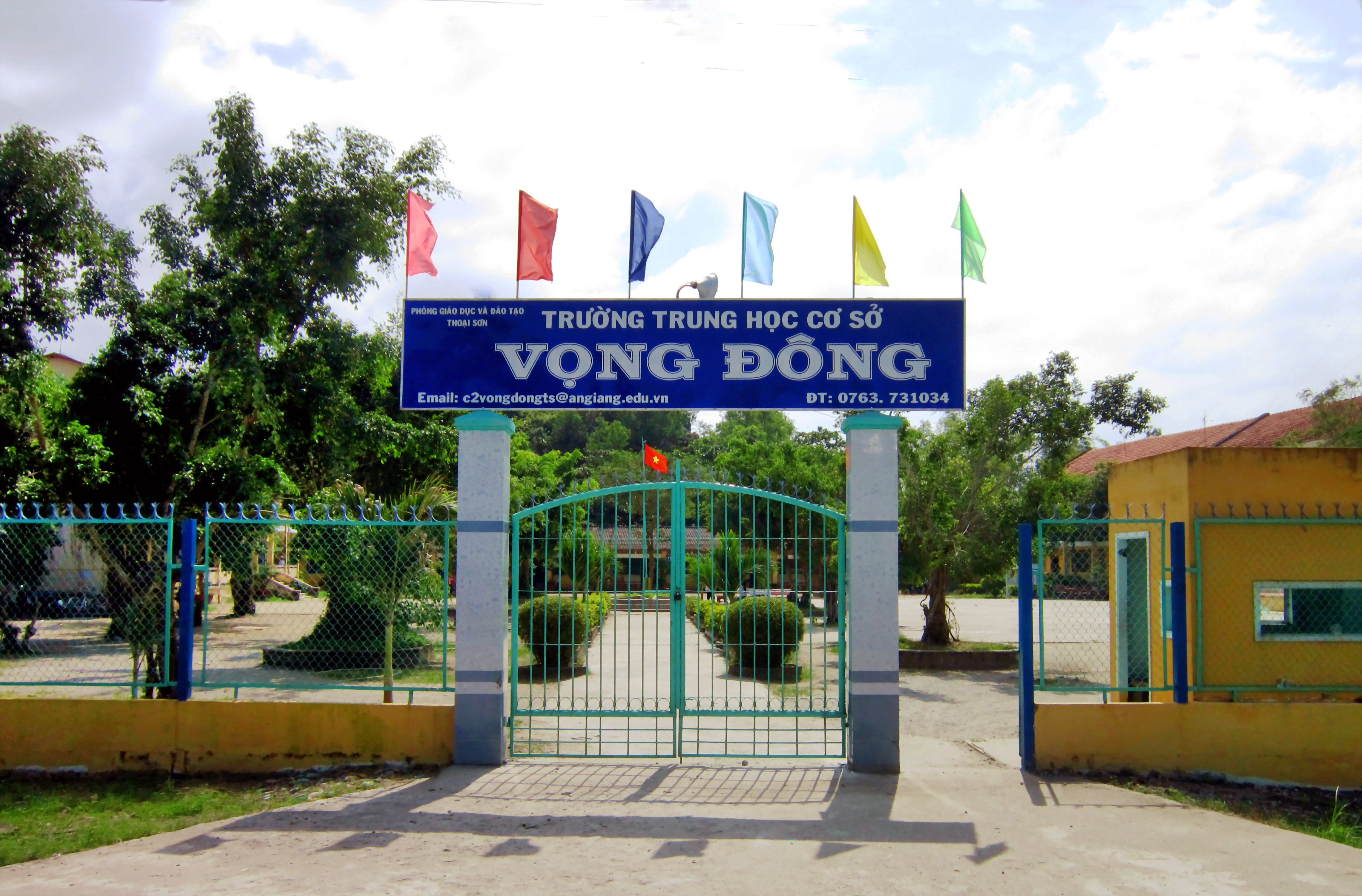 Trường PTCS xã Vọng Đông, thuộc huyện Thoại Sơn, An Giang, Việt Nam.